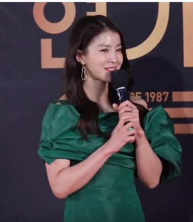 12월 31일 오후 서울시 영등포구 여의도 KBS 신관 웨딩홀에서 '2019 KBS 연기대상' 레드카펫 행사가 열려 '왜그래 풍상씨' 배우 이시영, 최대철, 신동미가 참석해 포토타임을 갖고 있다.